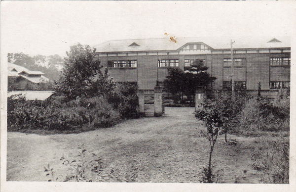 館高旧校舎